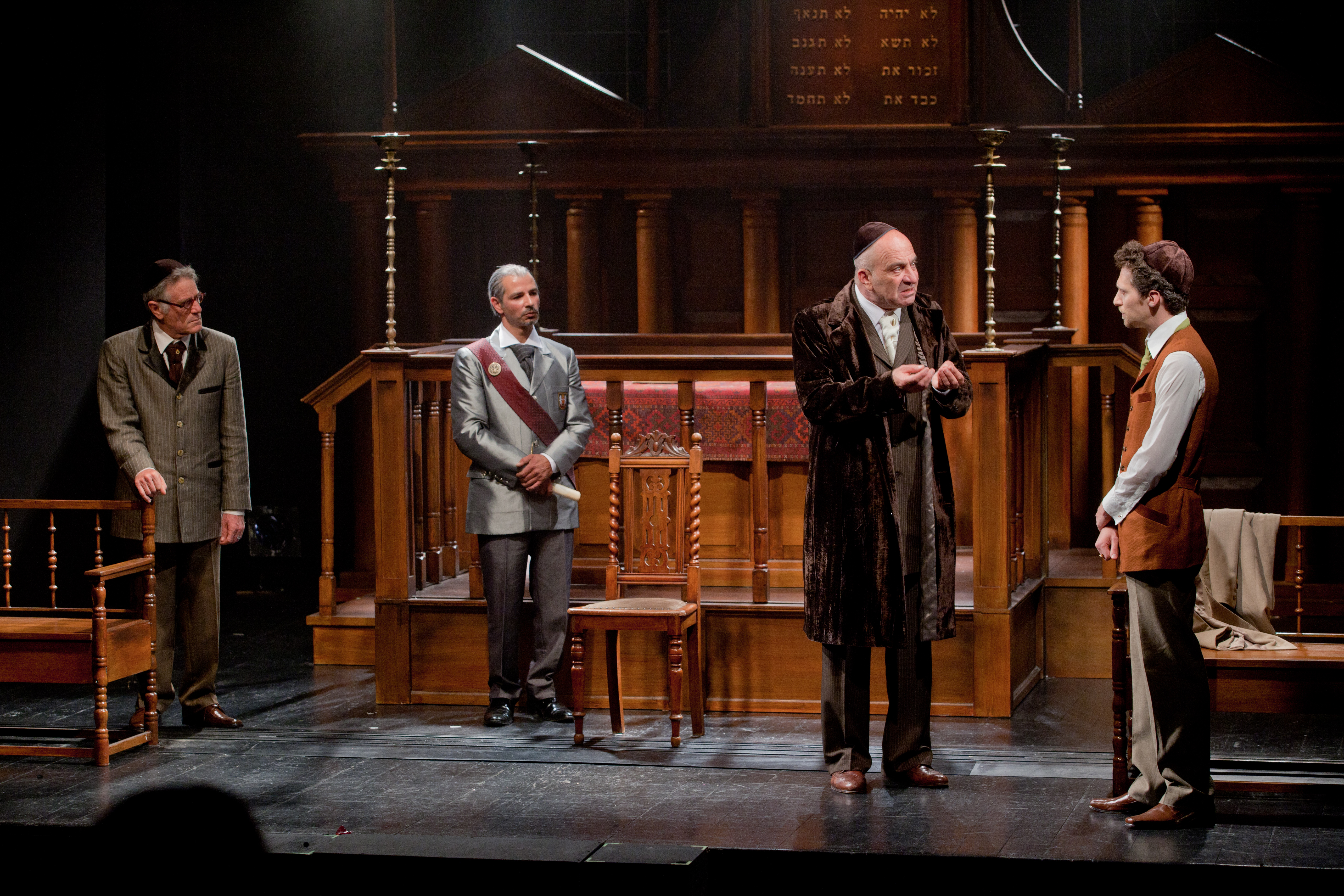 ויטלי פרידלנד, אריה צ'רנר, יוסי עיני ואבי פניני, במחזה "ירושלים החדשה", בבימויו של סיני פתר, תיאטרון החאן, 2012